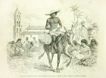 "L'aguador, marchand d'eau à Barranquilla" Croquis paru dans : André, Édouard L'Amérique Équinoxiale (Colombie-Equateur-Perou) Paris, Librería Hachette, 1869, p. 16